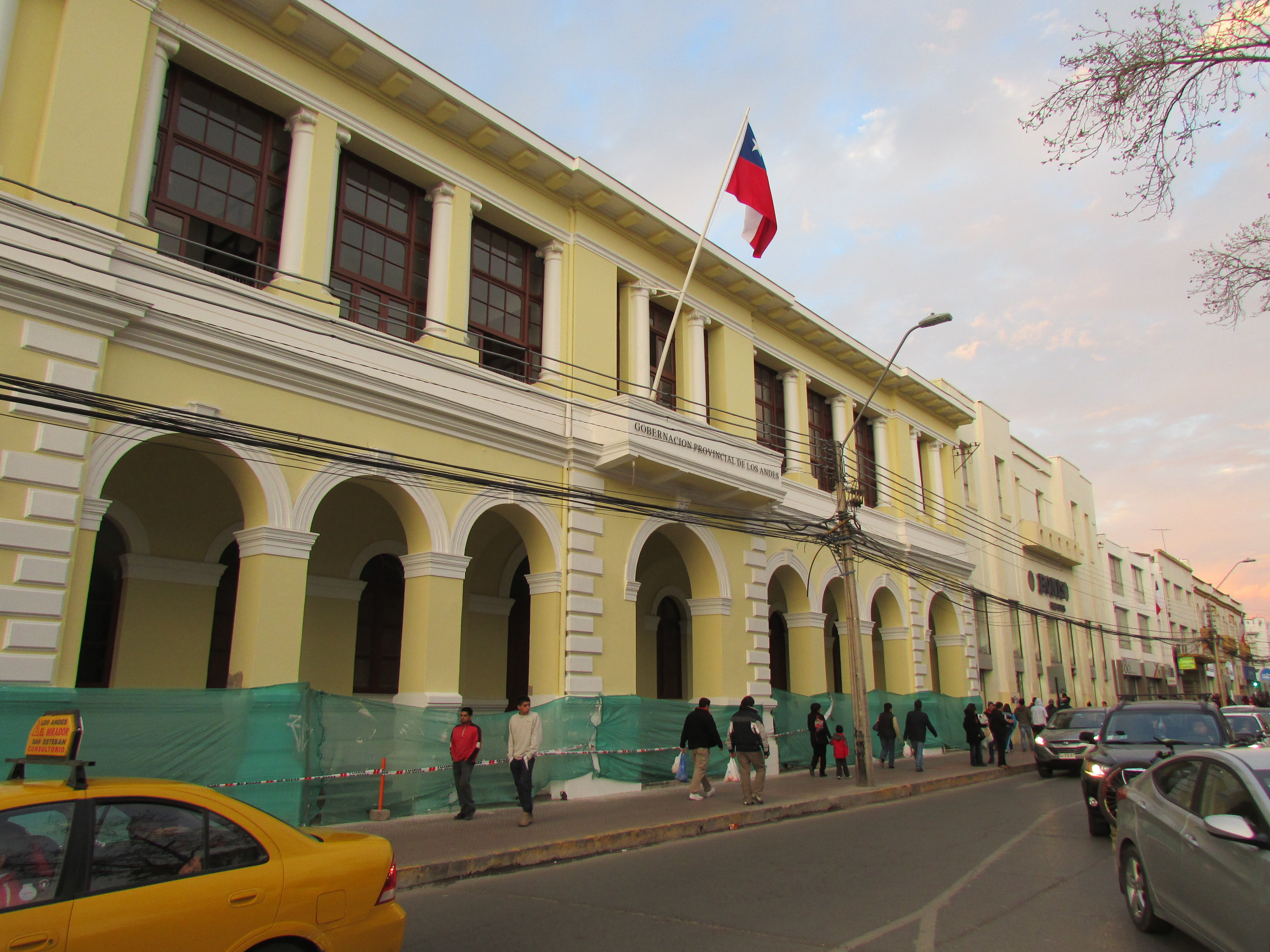 Edificio de la Gobernación Provincial de Los Andes This is a photo of a national monument in Chile: 443